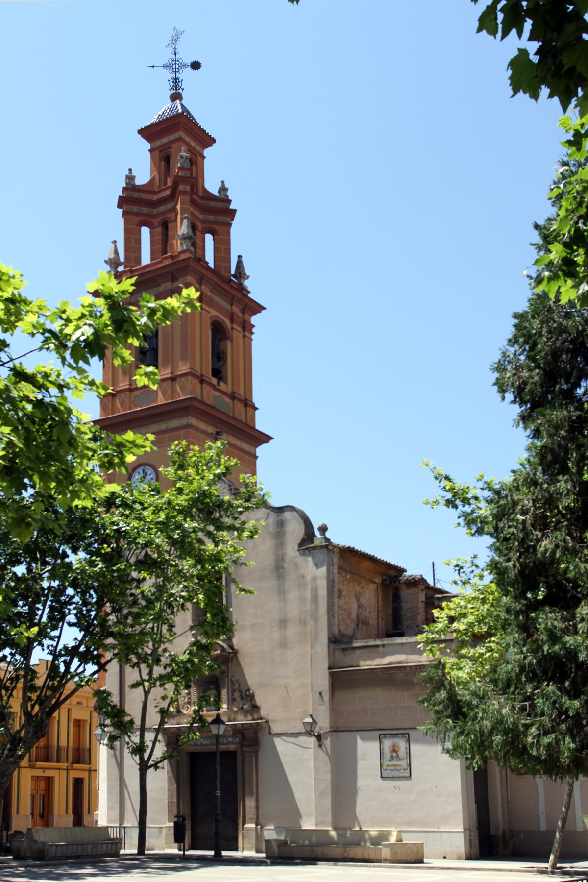 Iglesia de Nuestra Señora de la Misericordia (Campanar)